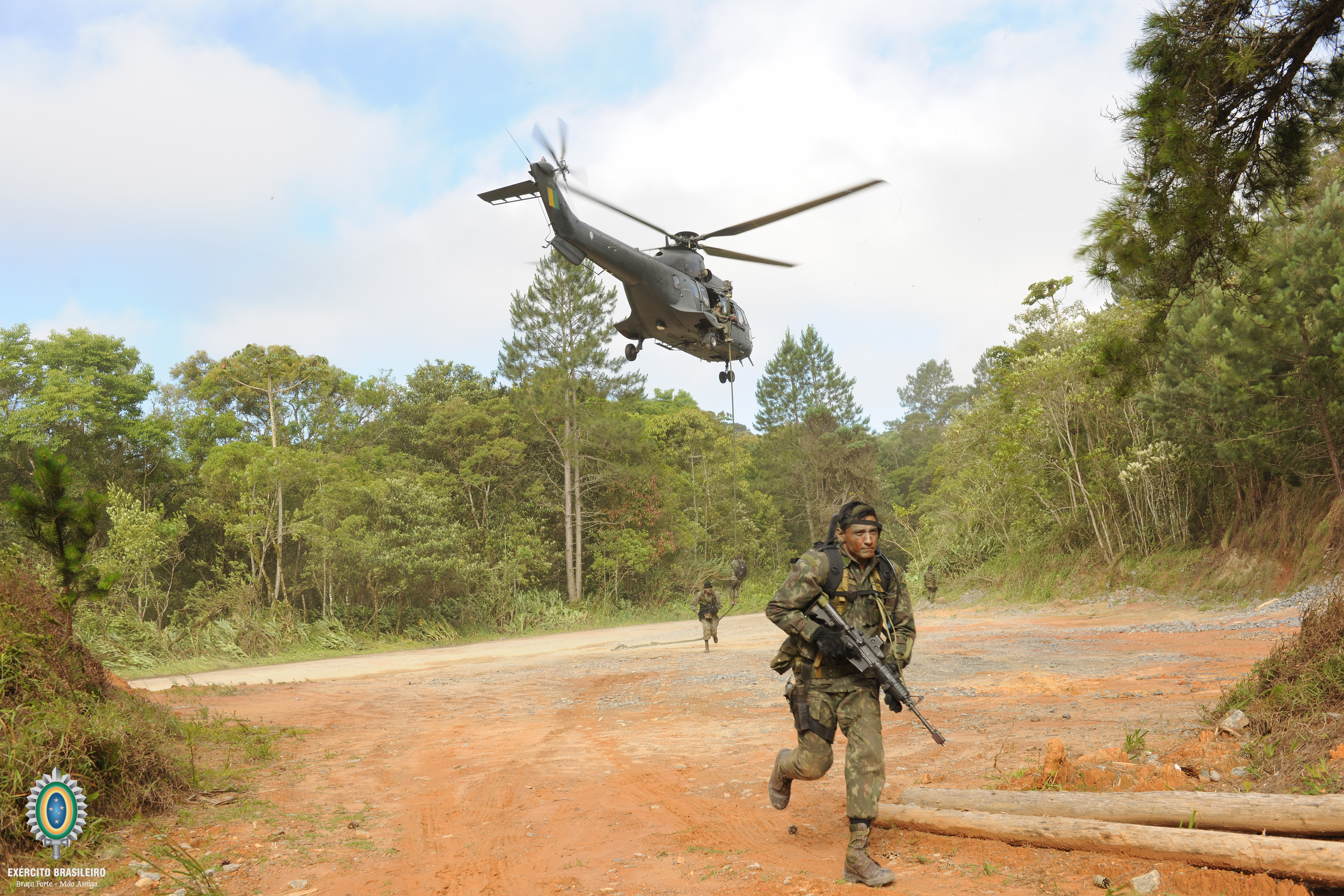 Comandos, Forças Especiais, combatente, Exército, Tiro instintivo caatinga, paraquedistas, atirador, sniper, mergulhadores